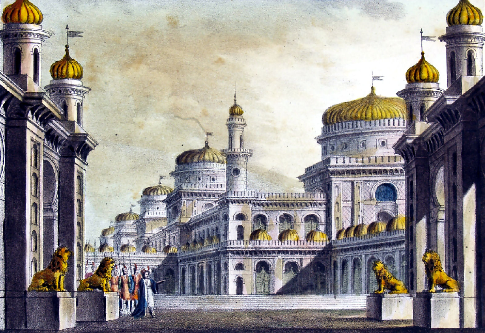 Décor du cinquième tableau de l'Acte II de Il crociato in Egitto de Meyerbeer par Alessandro Sanquirico pour la première à La Scala de Milan (1826)